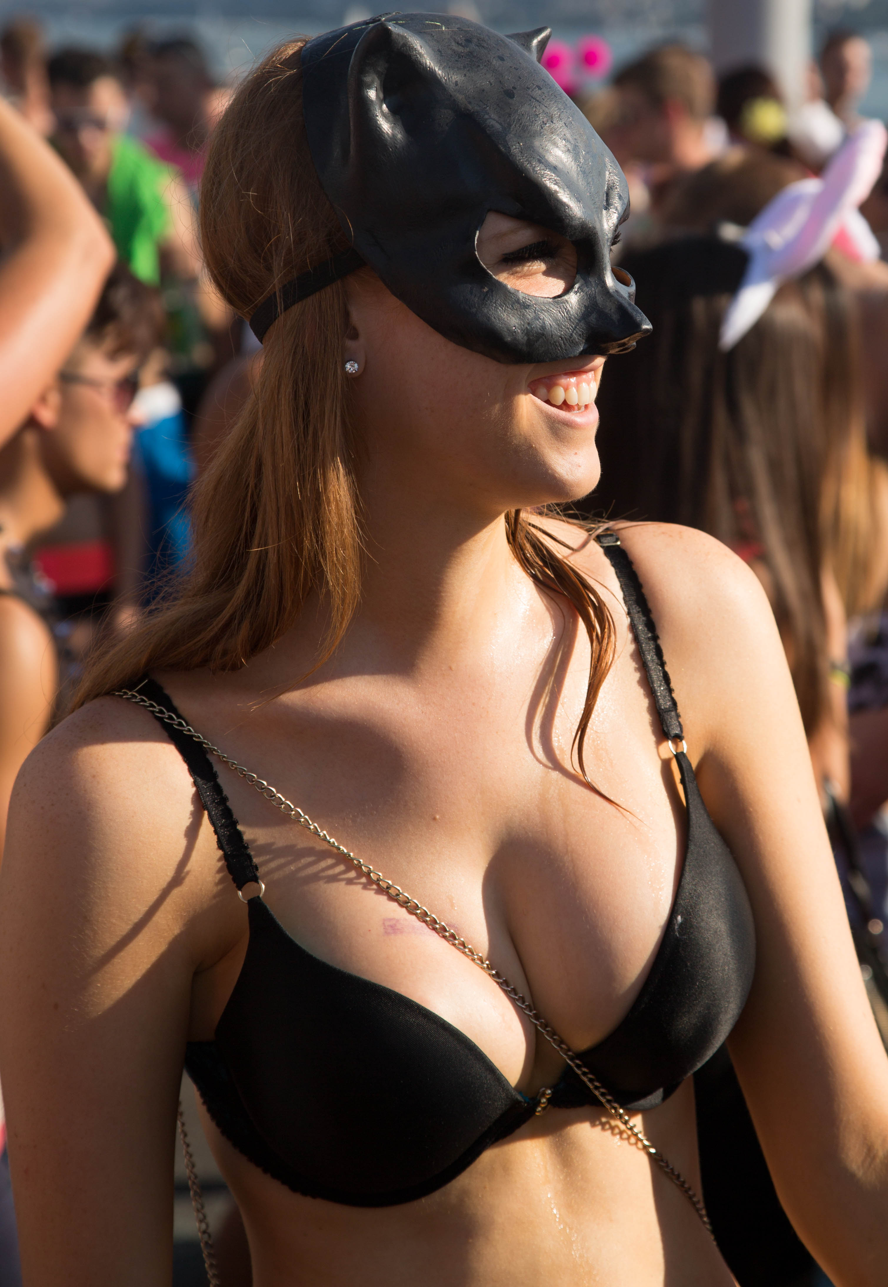 Street Parade Zürich 2013